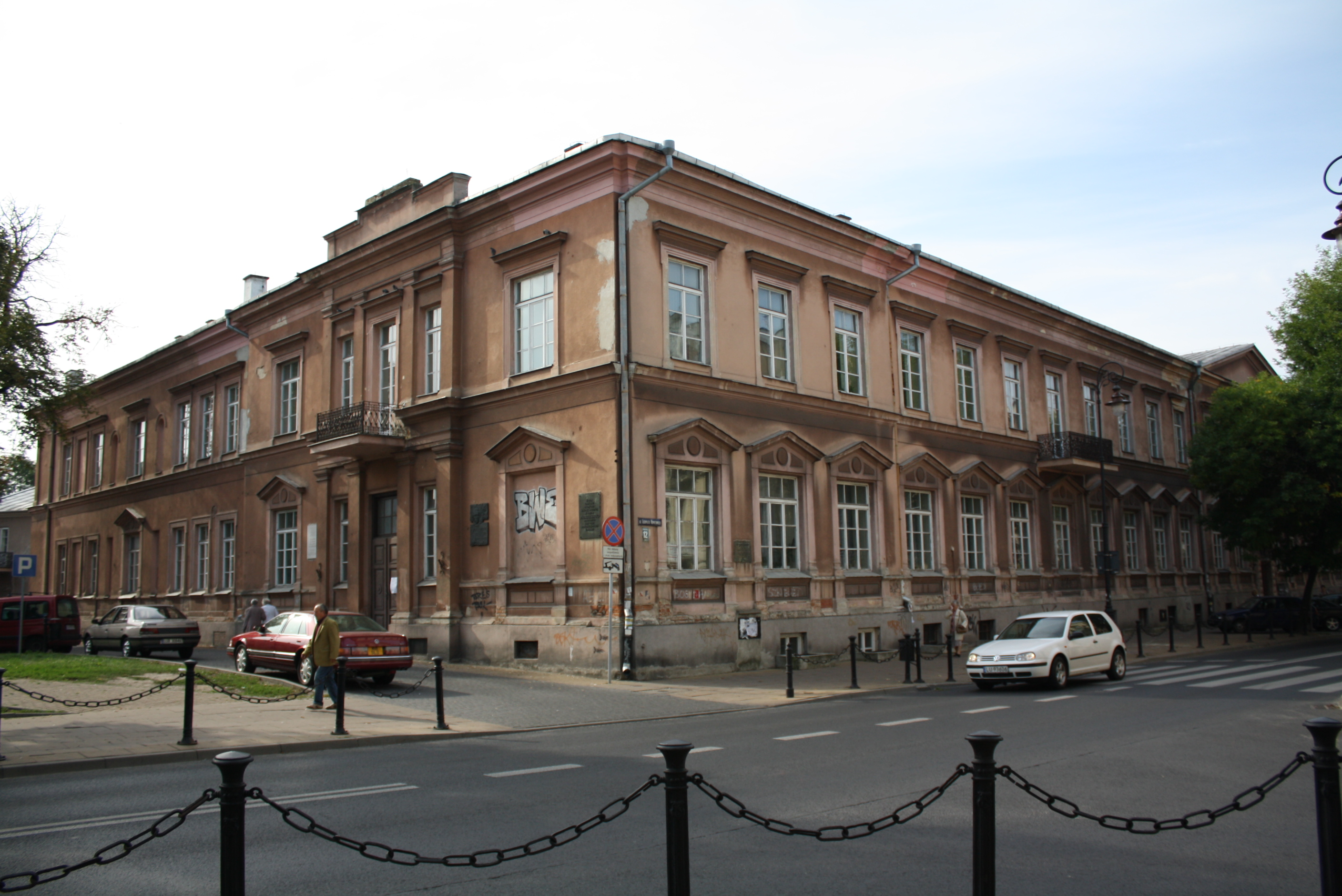 Szkoła Wojewódzka Lubelska ul. Narutowicza 12